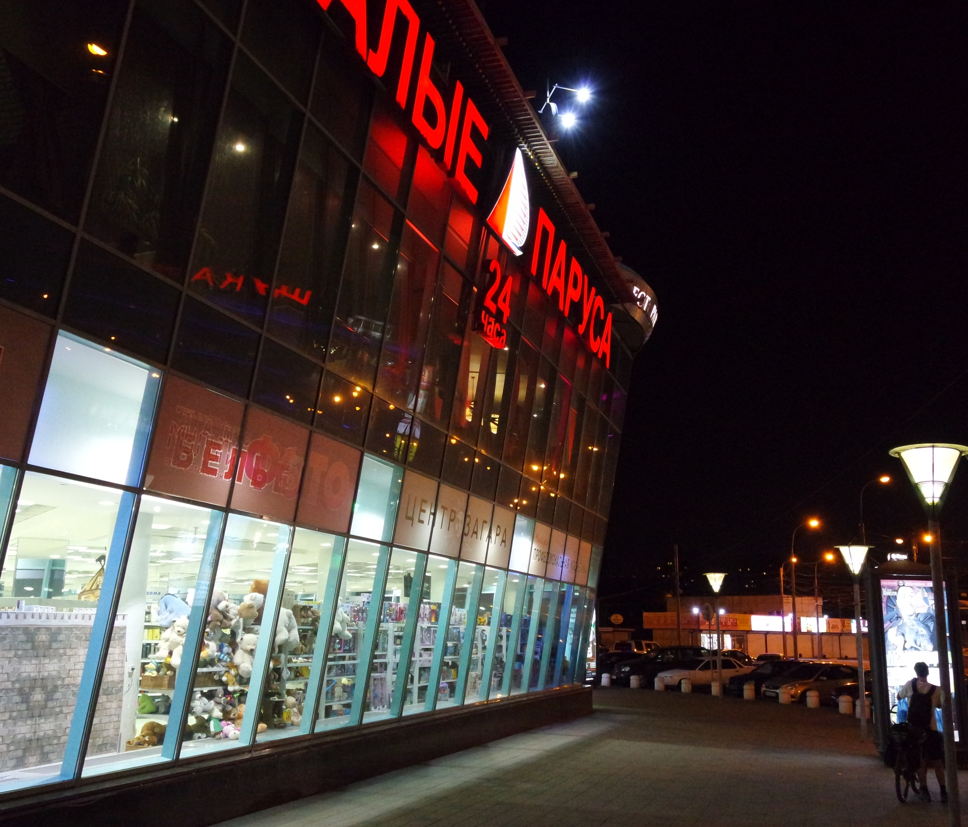 Наклонный стилобат жилых высоток-близнецов (Авиационная, 66, около метро Щукинская). В стилобате расположен универсам и офис торговой сети «Алые паруса»